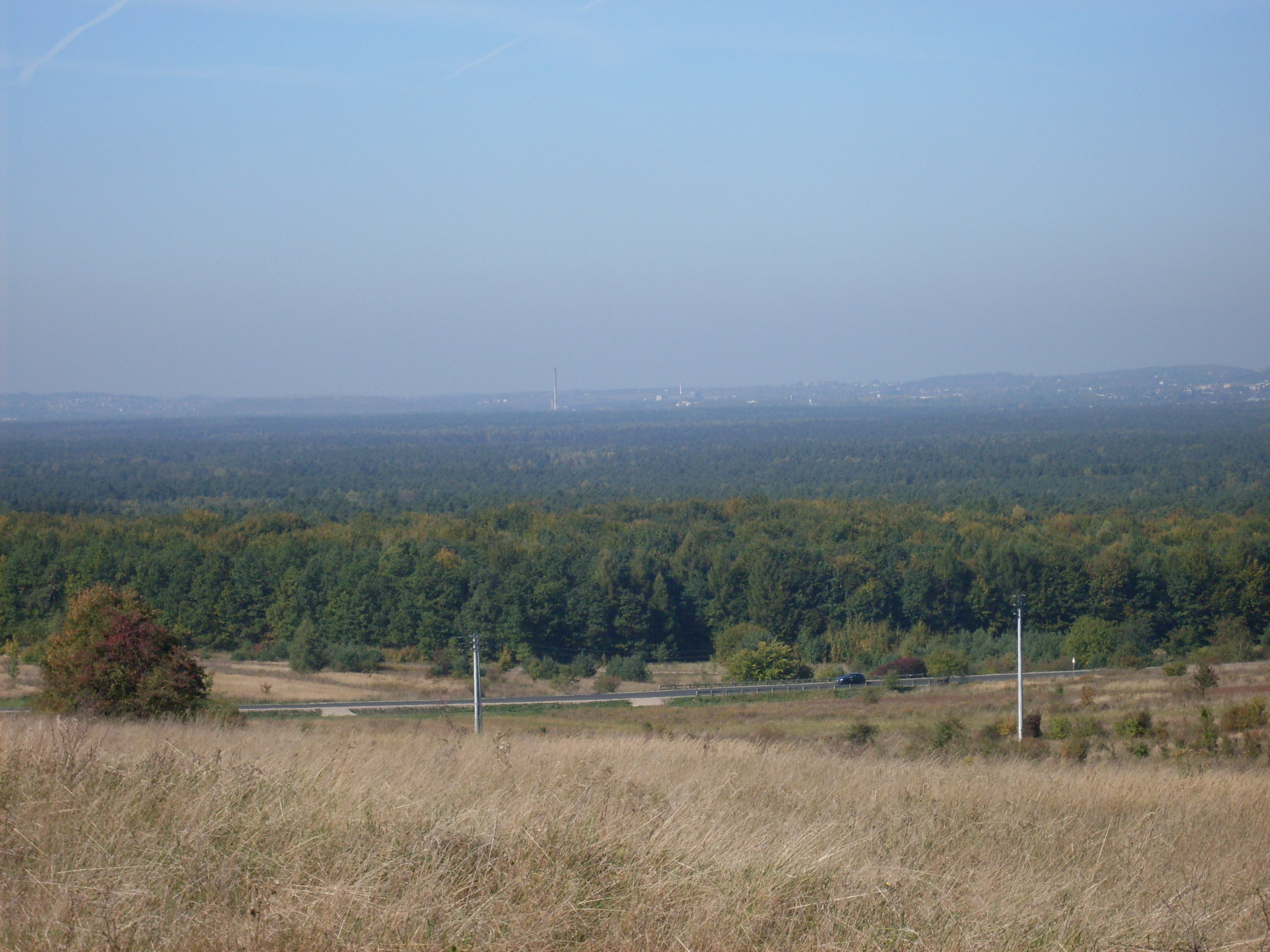 Widok na Puszcze Dulowską od strony Rudna